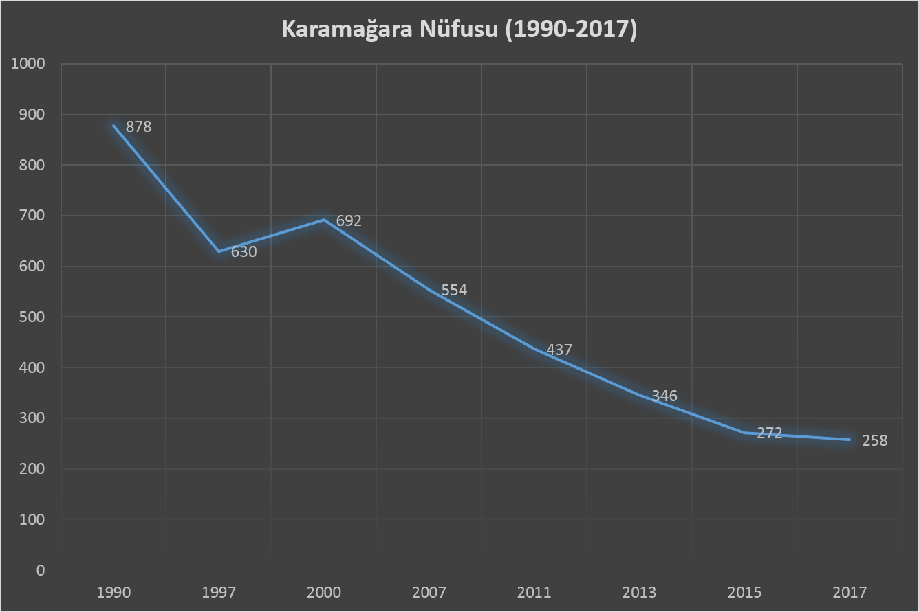 Karamağara Köyü'nün (Elbistan-Kahramanmaraş) Nüfus Verileri TÜİK Verilerine bakılarak hazırlanmıştır. [1] [2]